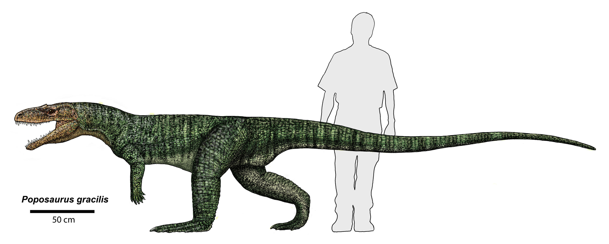 Credit Dr. Jeff Martz/NPS